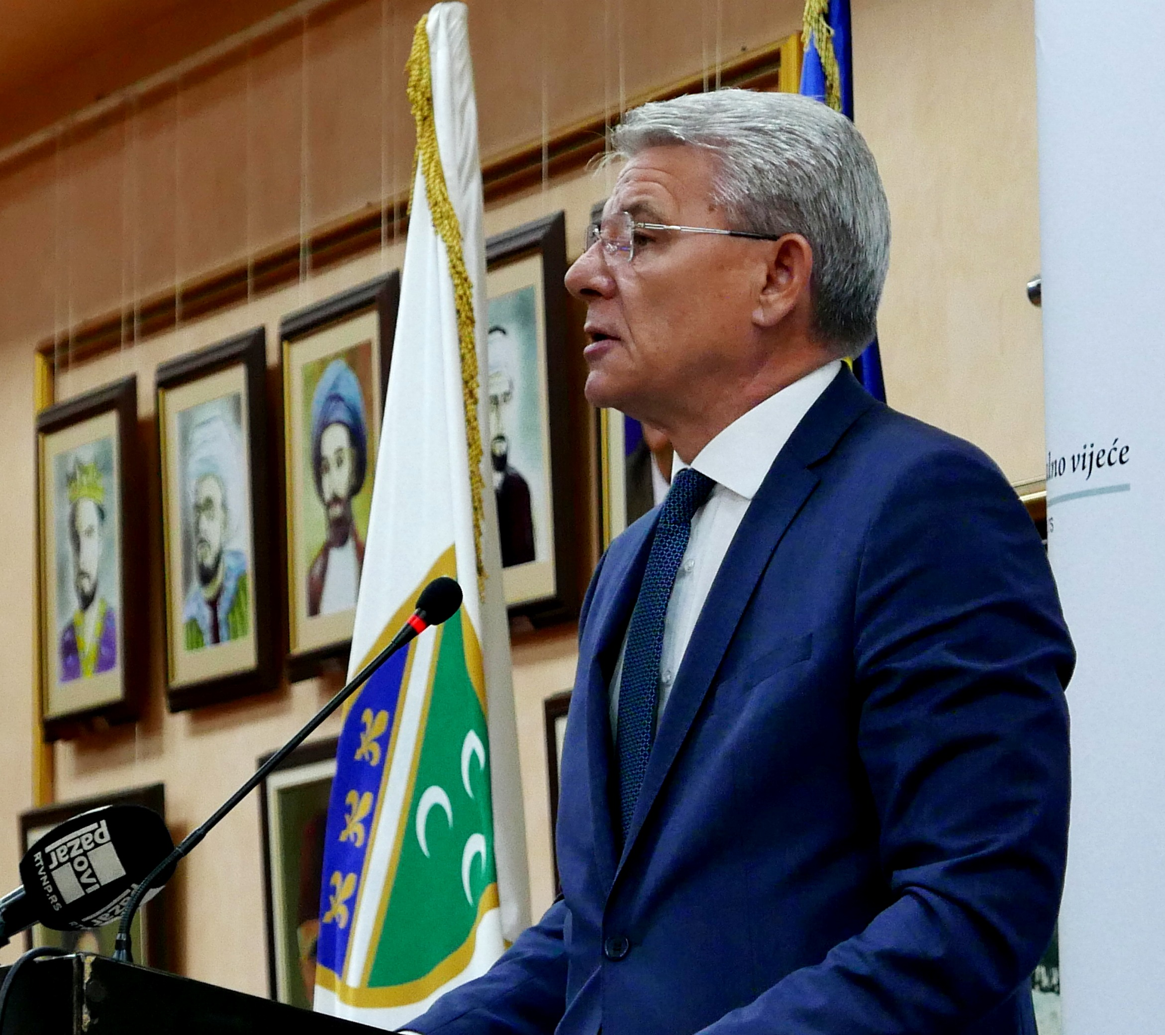 Shefik Xhaferoviq, aktualisht anëtar i kryesisë së Bosnjës dhe Hercegovinës